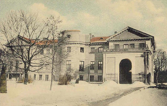 Палац князів Санґушків в Славуті. Поштівка.